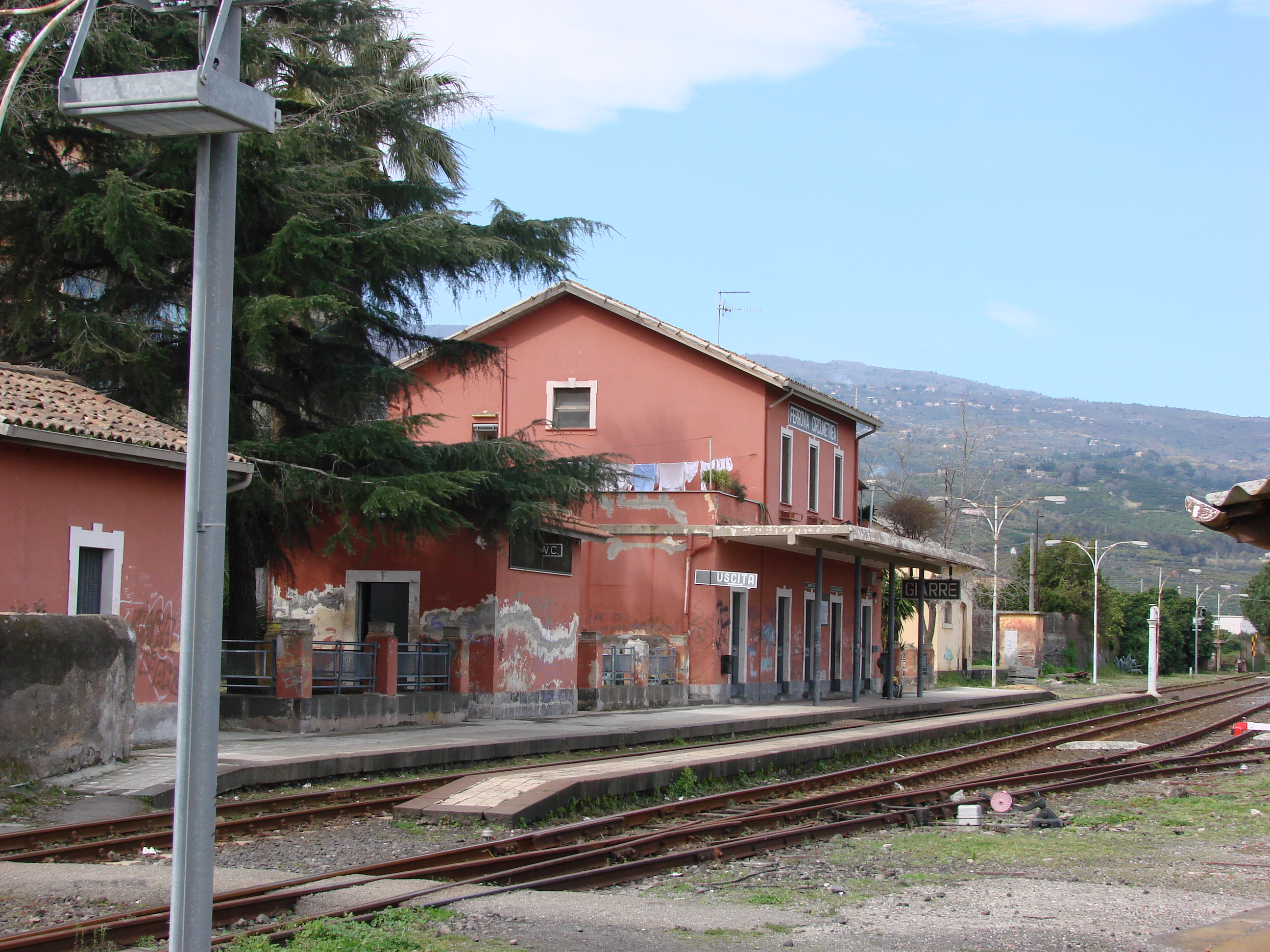 Stazione di Giarre della Ferrovia Circumetnea